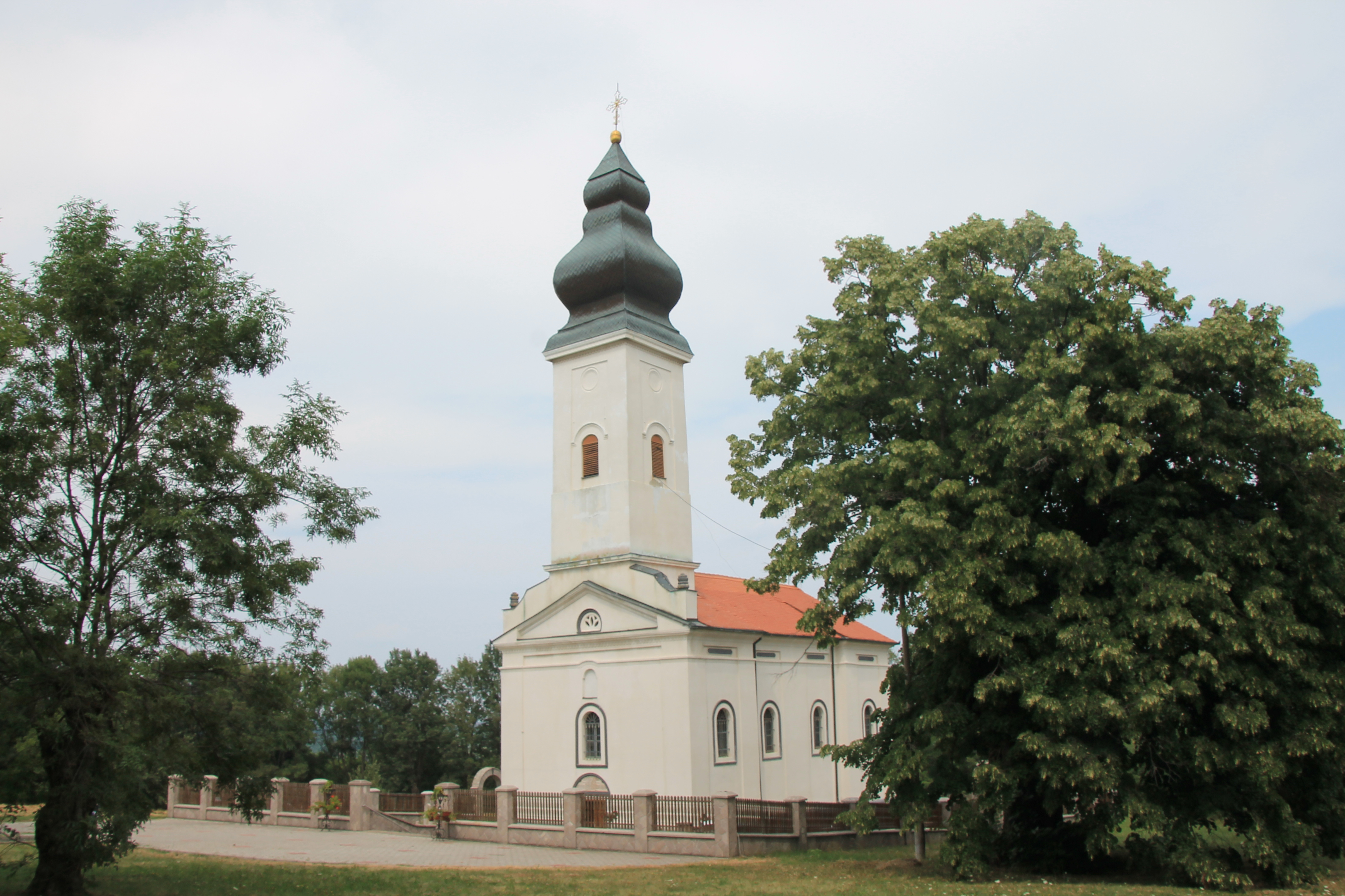 Crkva Sv. Petra i Pavla (Čumić)